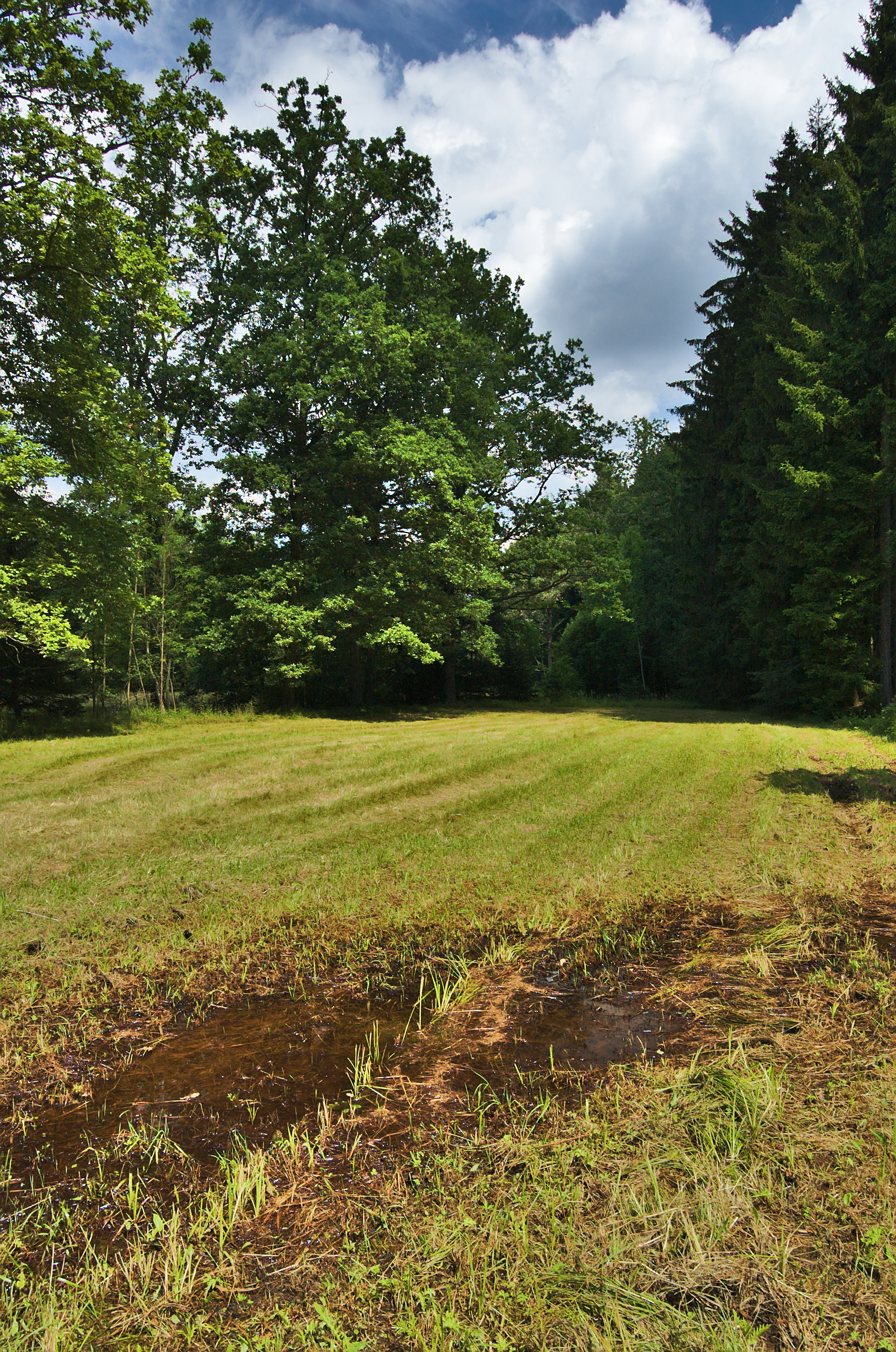 Přírodní památka Horní Bělá, okres Blansko